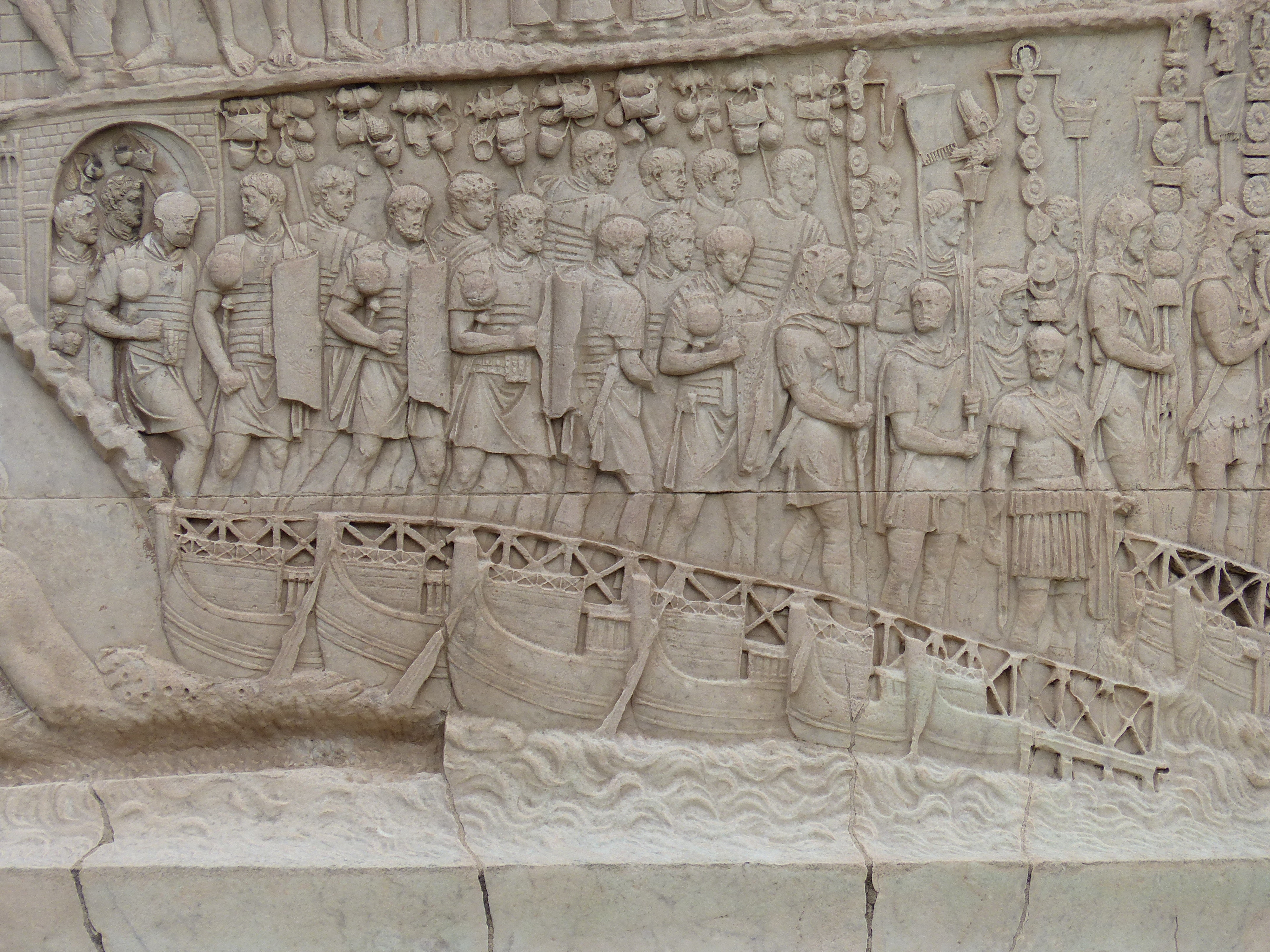 Detalles, Columna Trajana, Roma